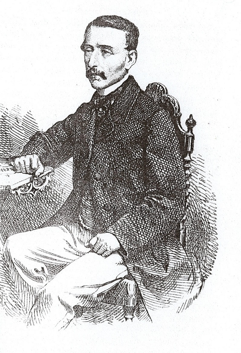 Ritratto del senatore PETITTI DI RORETO Ilarione (vedi ,erroneamente caricata in precedenza come ritratto del senatore Agostino Petitti (